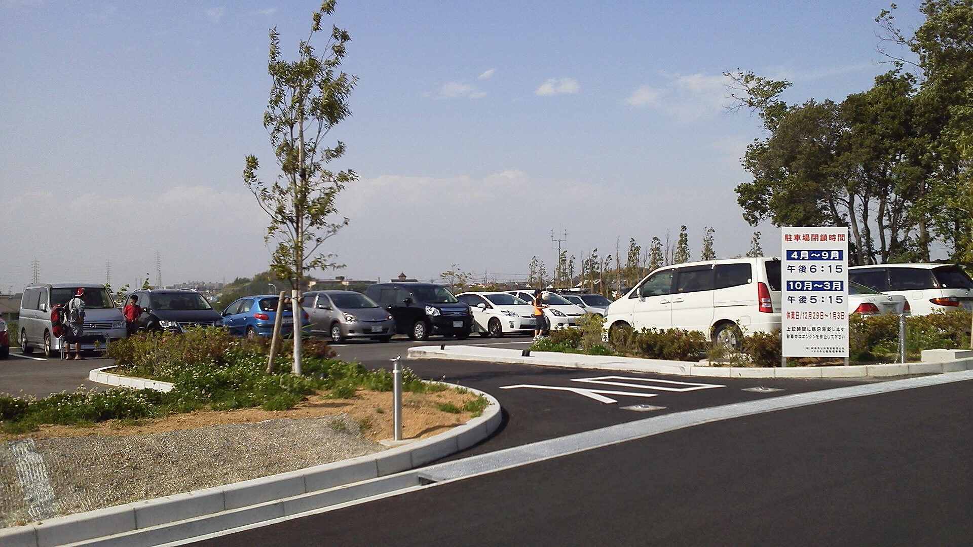 投稿者自身が大阪府和泉市内の児童公園のひとつである『くすのき公園』を撮影。 （駐車場）